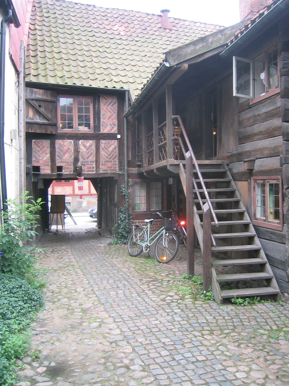 Brooktorpsgården gårdssidan